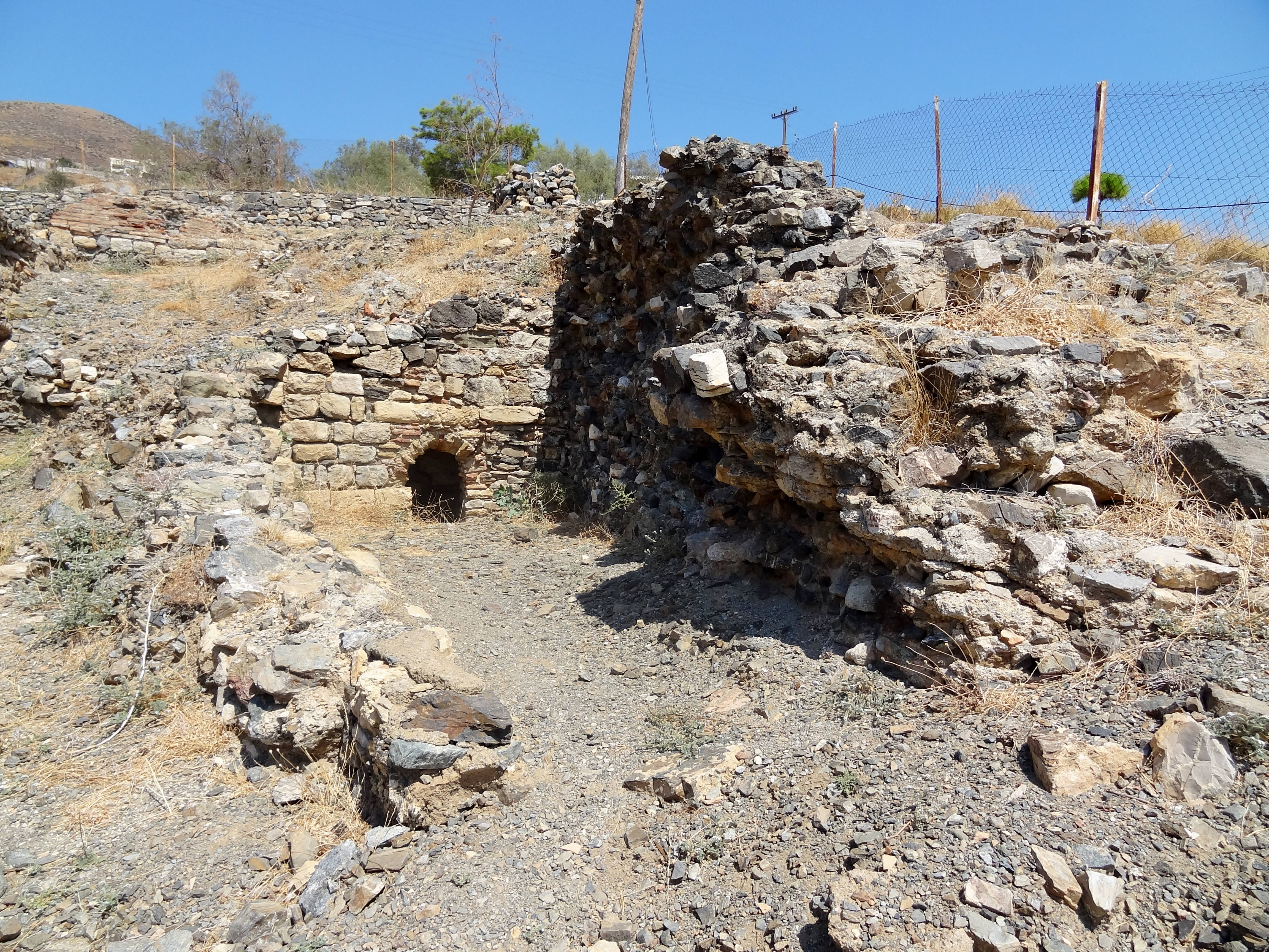 Reste des antiken Leben (Λεβήν) in Lendas, Gemeinde Gortyna, Regionalbezirk Iraklio, Kreta, Griechenland